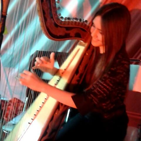 Joven arpista paraguaya, arpa paraguaya sin semitonos